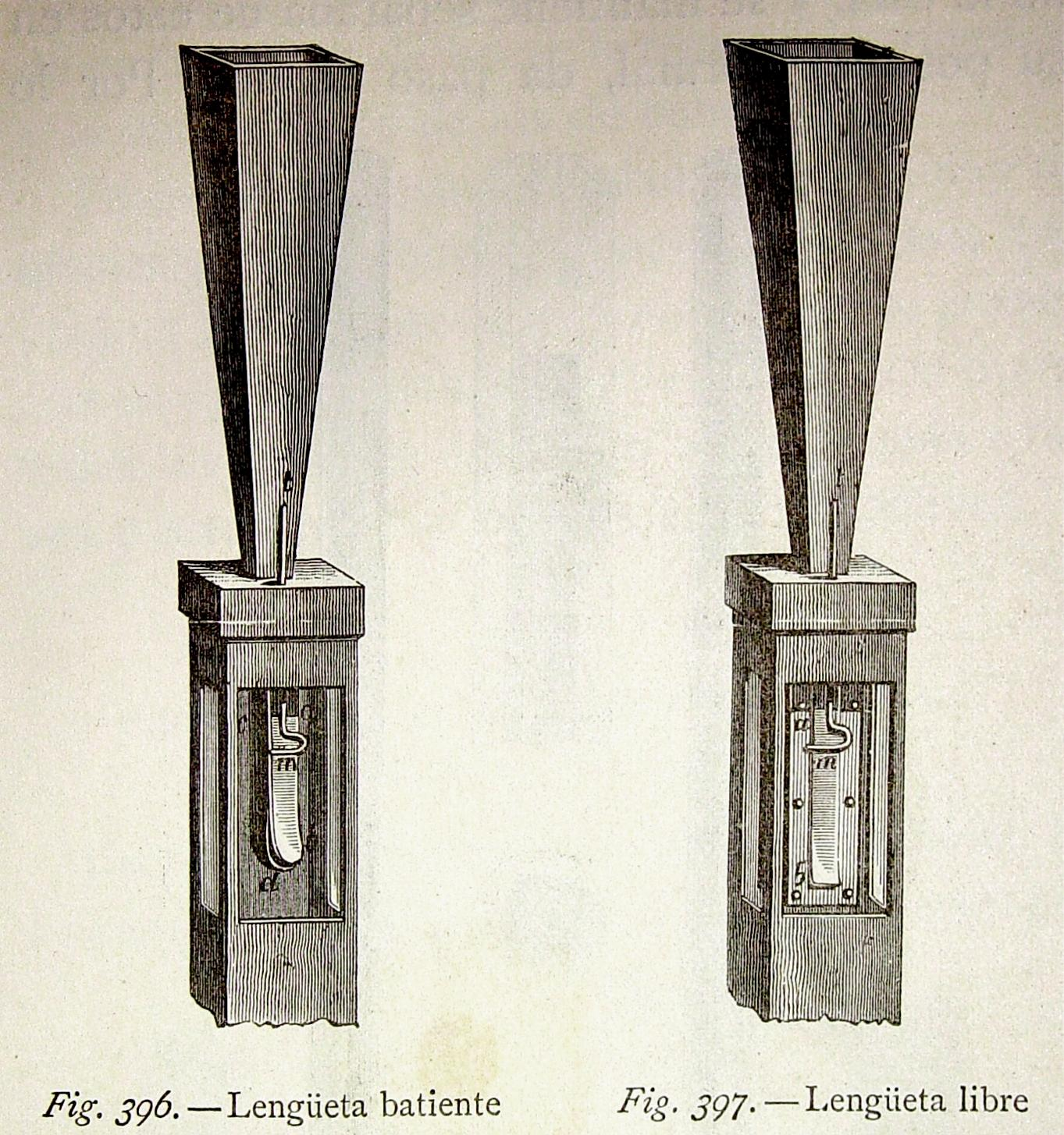 "Lengüeta batiente, Lengüeta libre". Ilustraciones pertenecientes al libro : El mundo físico : gravedad, gravitación, luz, calor, electricidad, magnetismo, etc. / A. Guillemin. - Barcelona Montaner y Simón, 1882